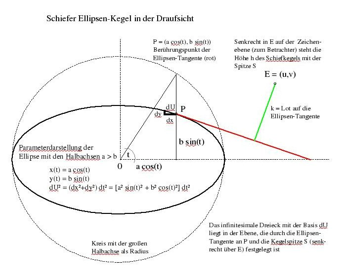 Ellipsenkegel (Draufsicht)